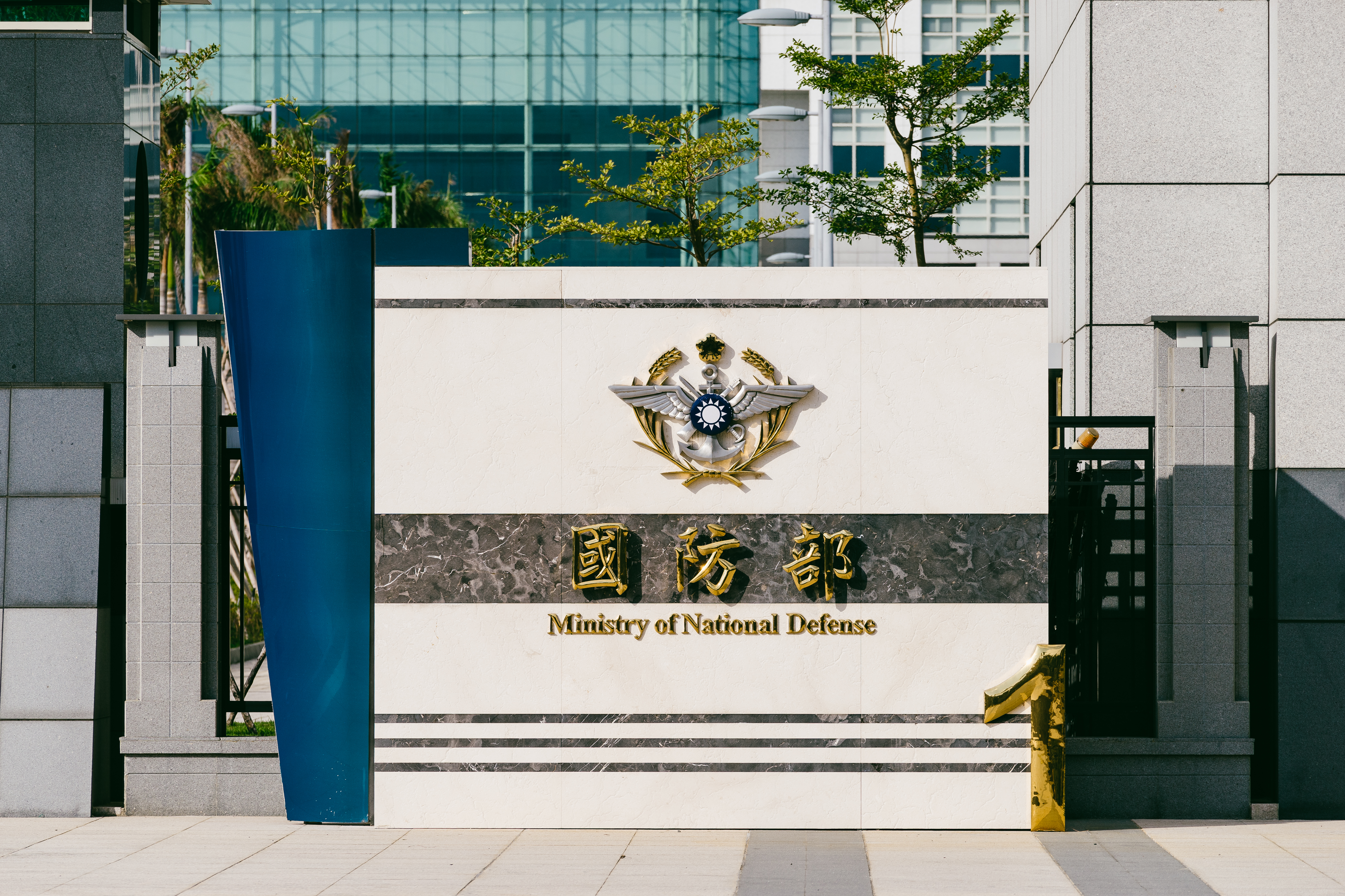 中華民國國防部大直博愛營區大門右側釘掛的國防部部徽。